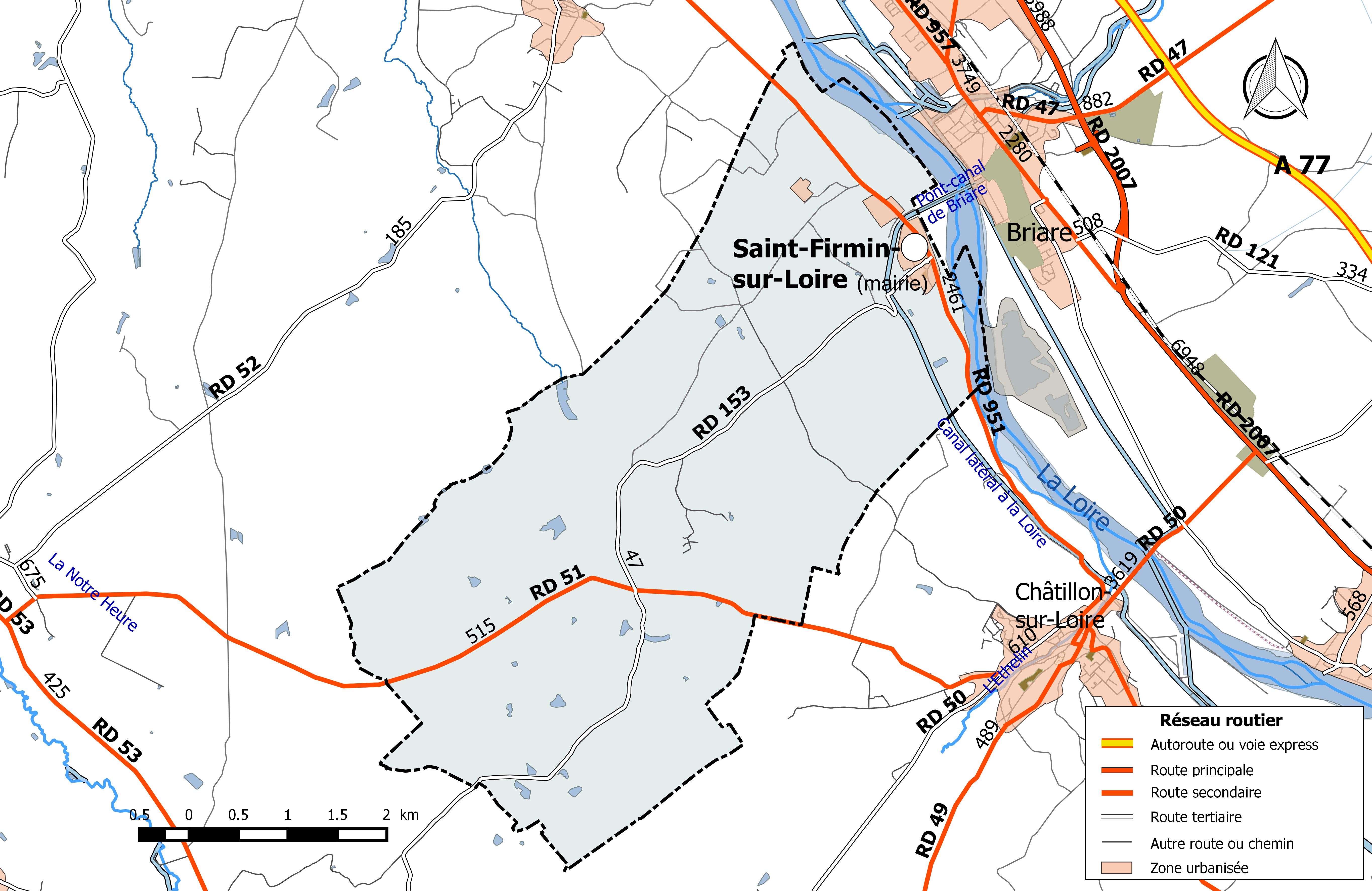 Carte du réseau routier de la commune de Saint-Firmin-sur-Loire.